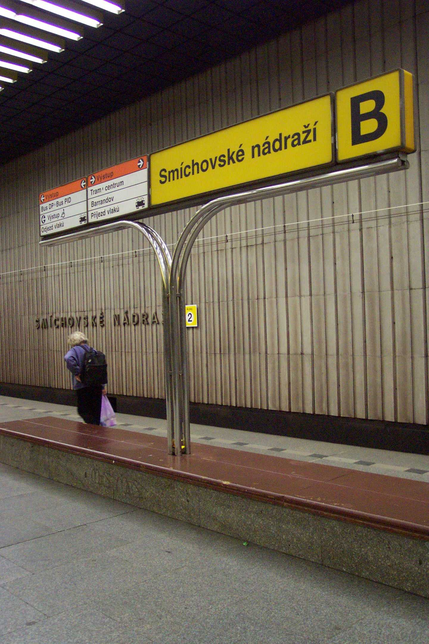 Nástupiště stanice metra Smíchovské nádraží - platform of metro station Smíchovské nádraží in Prague